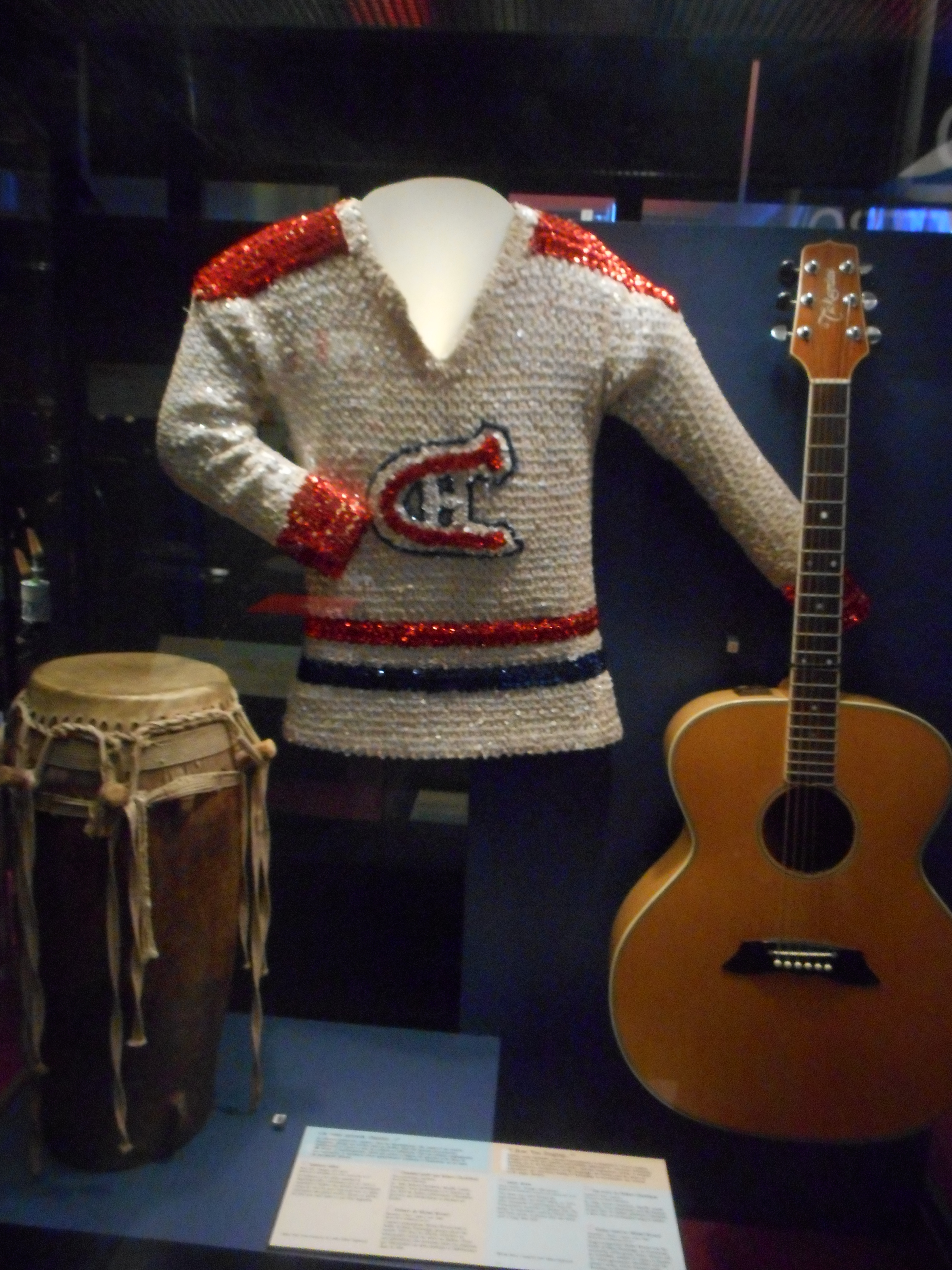 Musée de la civilisation, Québec Exposition : Le Temps des Québécois Chandail utilisé par Robert Charlebois pour L'Osstidcho